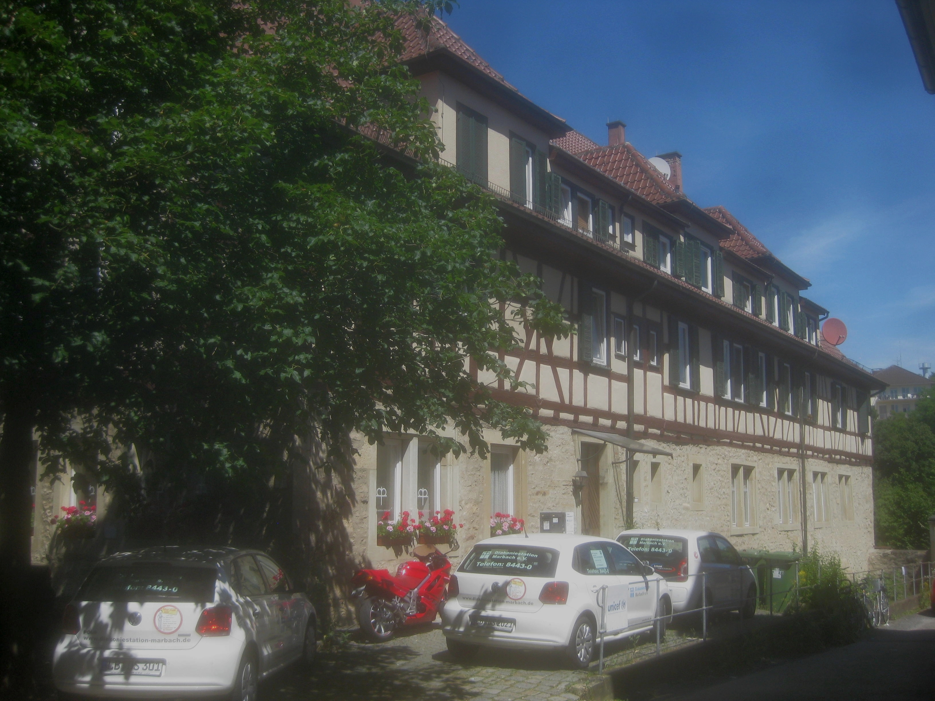 Marbach am Neckar, Untere Holdergasse 4, Westfassade.Im Mittelalter Gebäude der Marbacher Beginen, ab 1551 Lateinschule, nach dem Wiederaufbau ab 1702 Sammelschulhaus für alle Marburger Schulen.